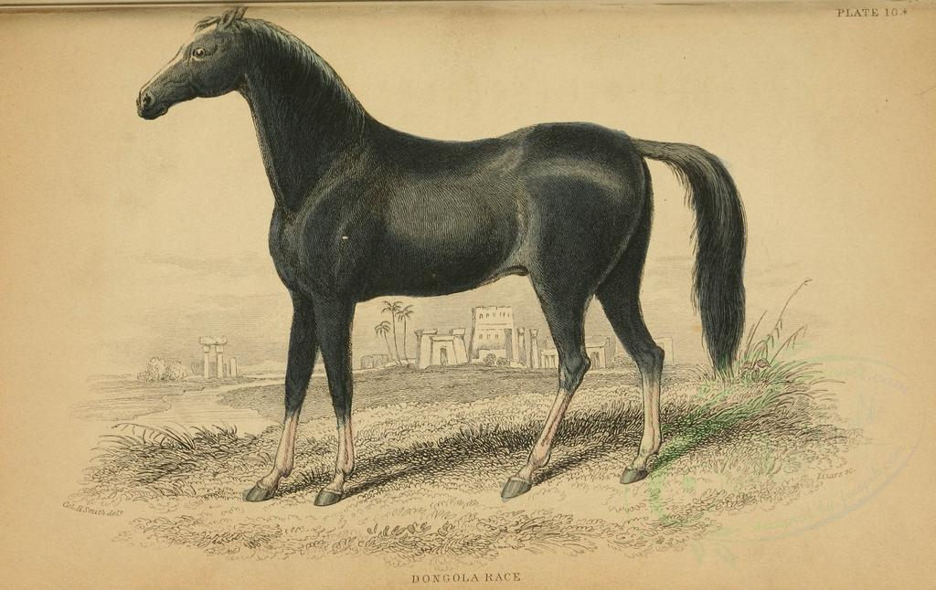 mammals-00009_-_DONGOLA RACE [3125x1973]@G._1_01_